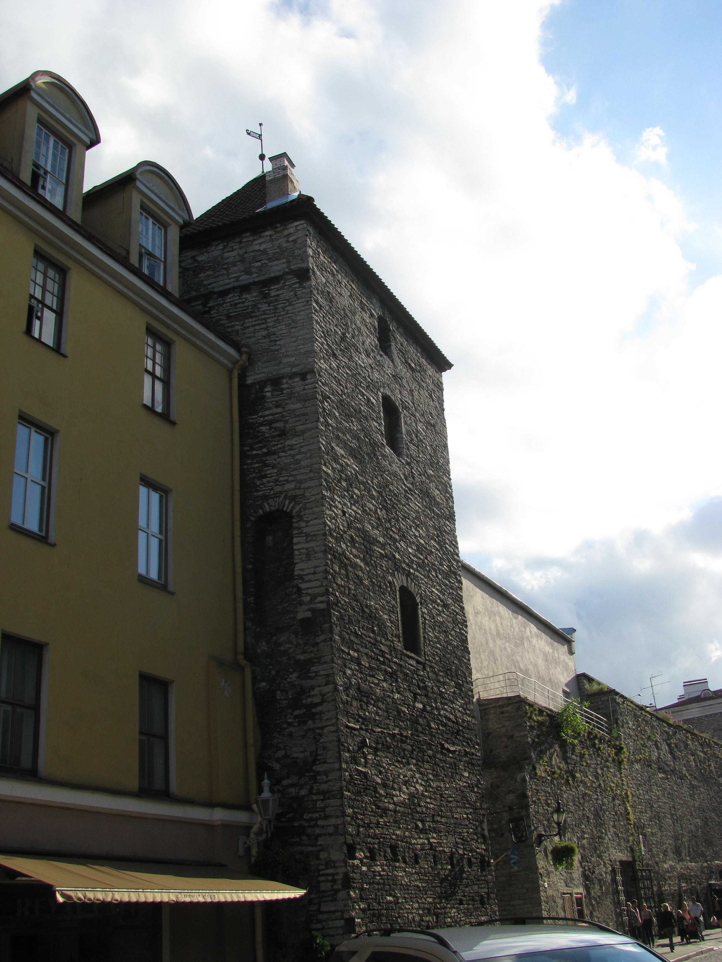 Assauwe torn Myyrivahe tänaval, vaade kino Sõprus poolt